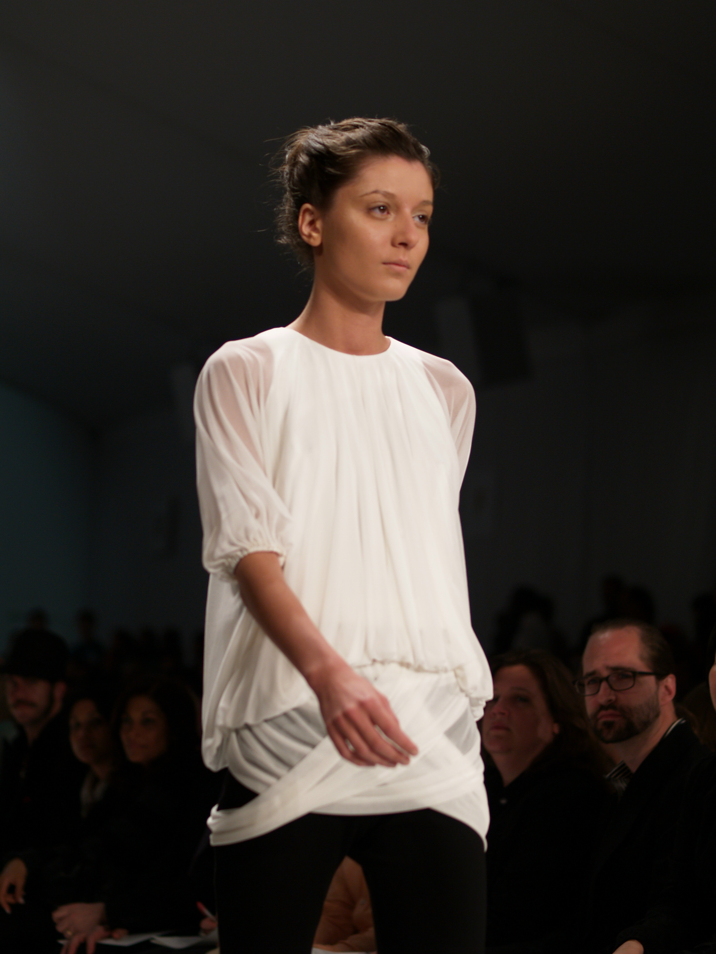 Model Irina Lazareanu